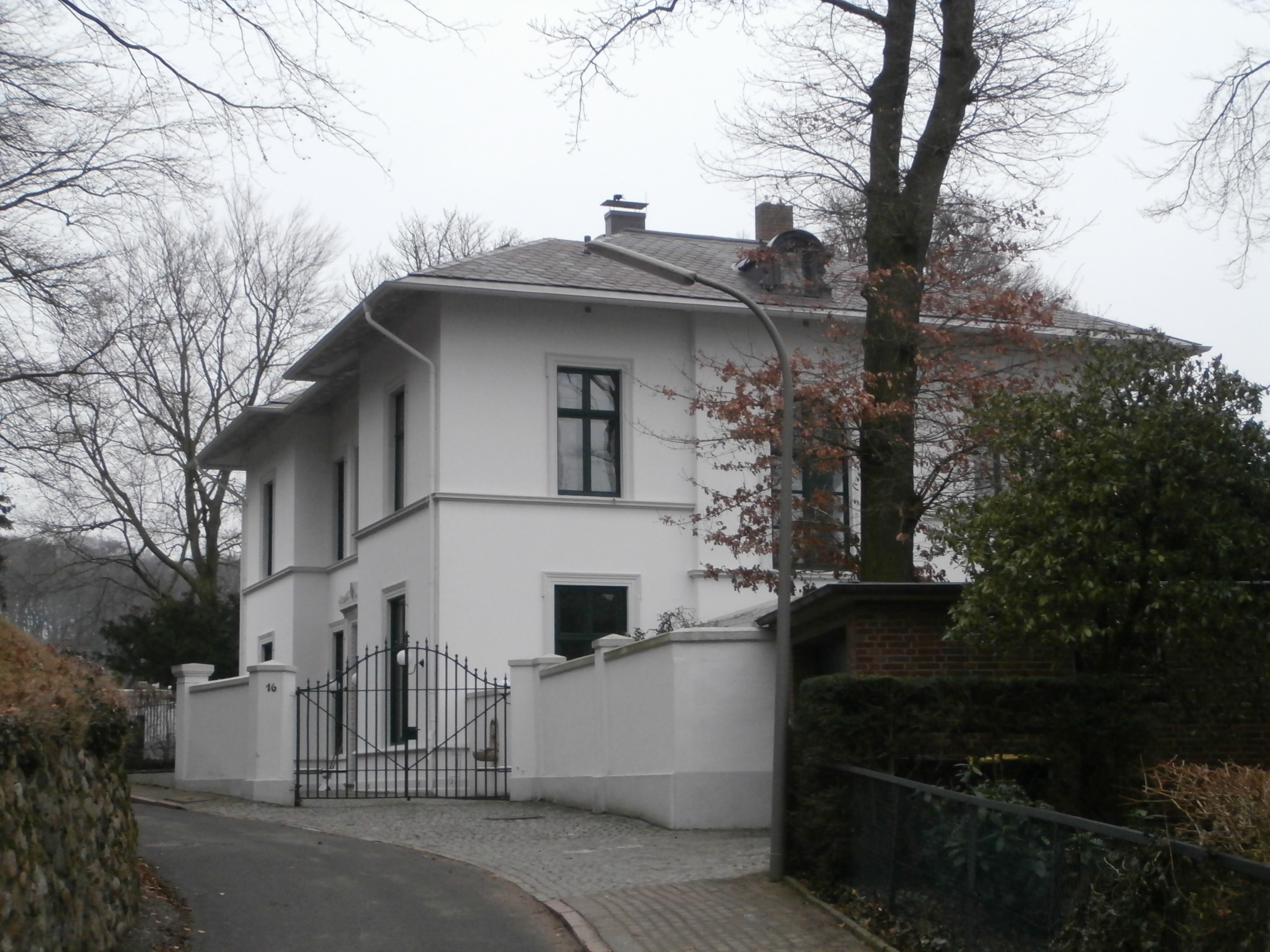 1865 bis 1866 nach Plänen des Architekten Auguste de Meuron errichtetes Landhaus.This is a photograph of an architectural monument.